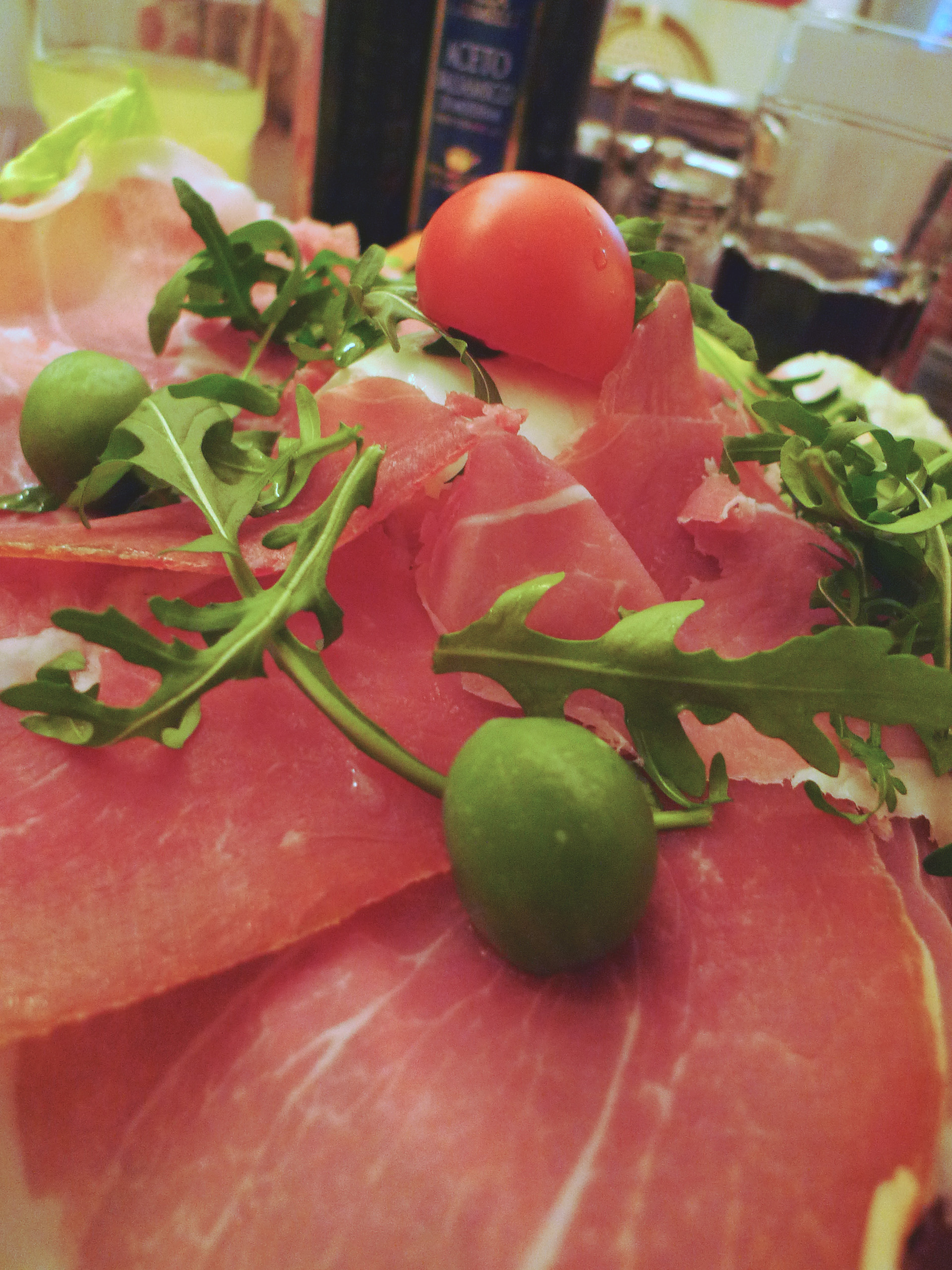 Prosciutto crudo di Parma - Italia.